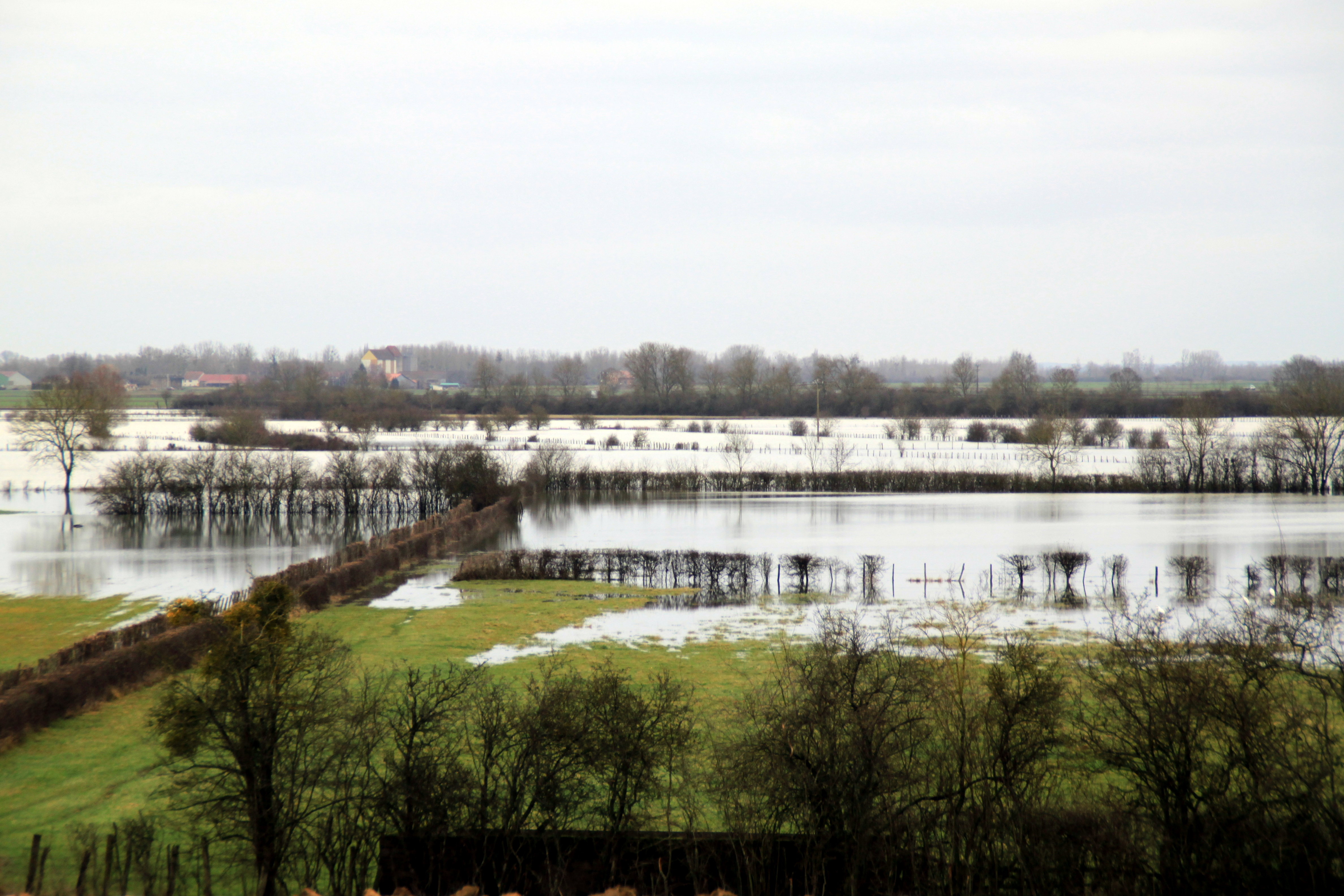 Überschwemmungsgebiet bei Hochwasser zwischen Pierre-de-Bresse - Charette-Varennes - Lays-sur-le-Doubs